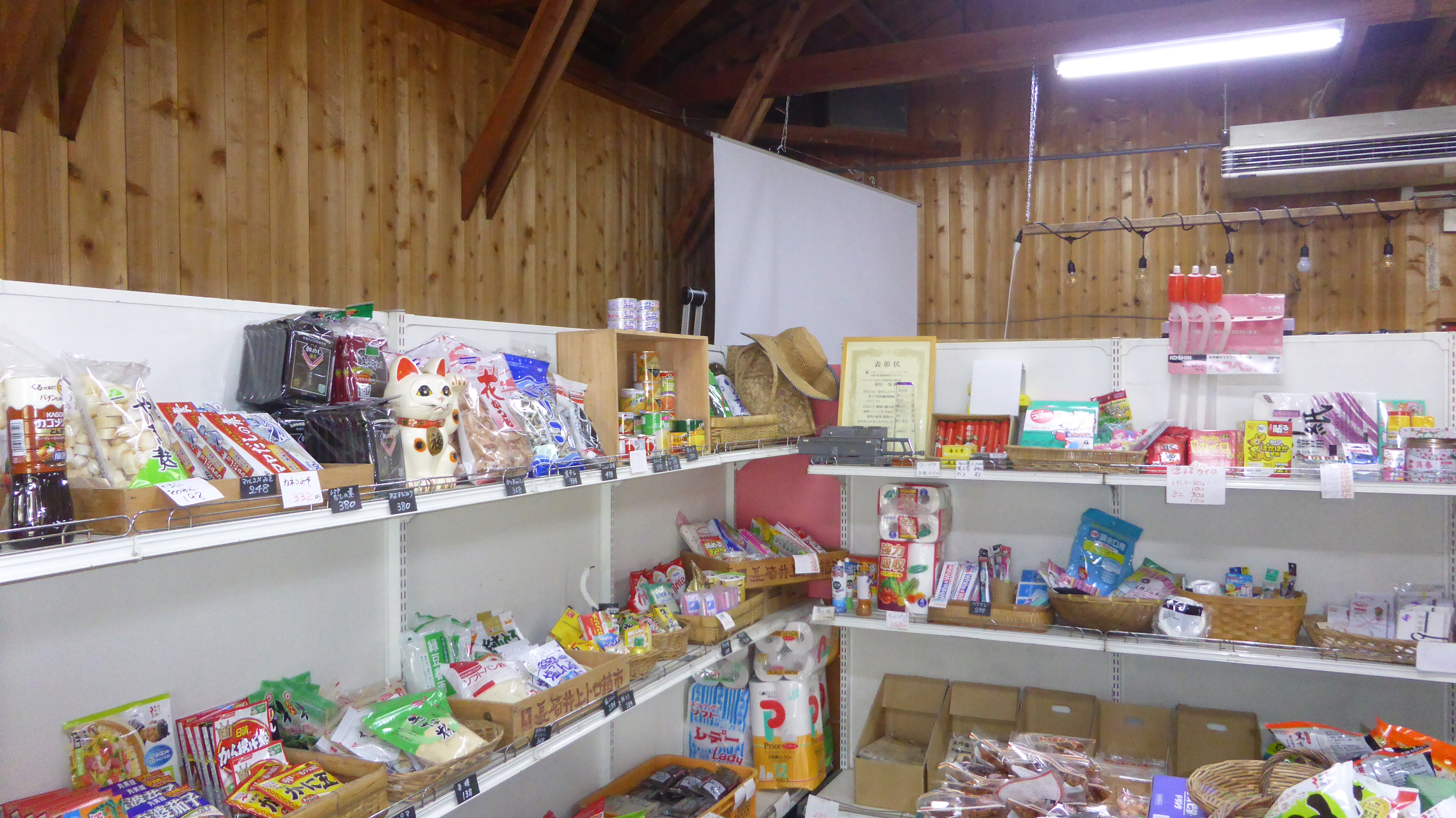 つねよし百貨店の店内。中央にはJIMOT CMの表彰状と盾が飾られている。2019年4月21日撮影。